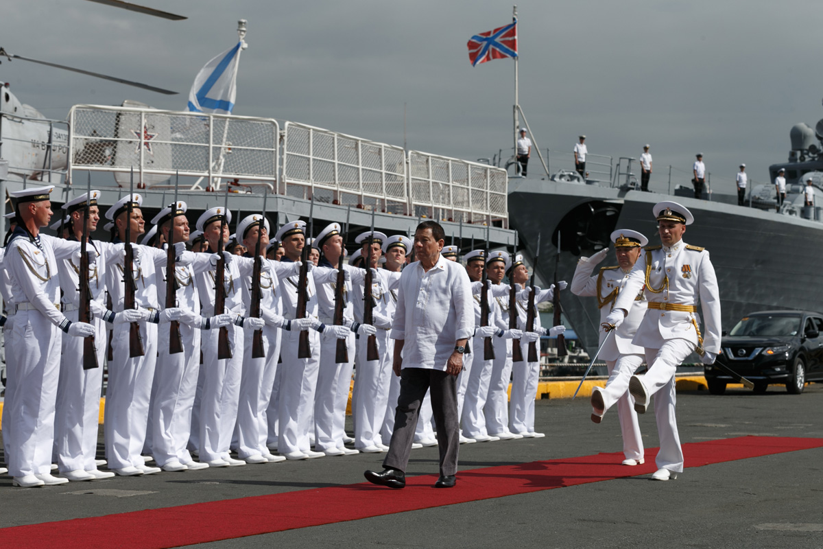 Церемония передачи филиппинской стороне партии российской продукции военного назначения с участием Президента Филиппин Родриго Дутерте и Министра обороны России генерала армии Сергея Шойгу. Филиппины, порт Манилы, борту БПК «Адмирал Пантелеев»